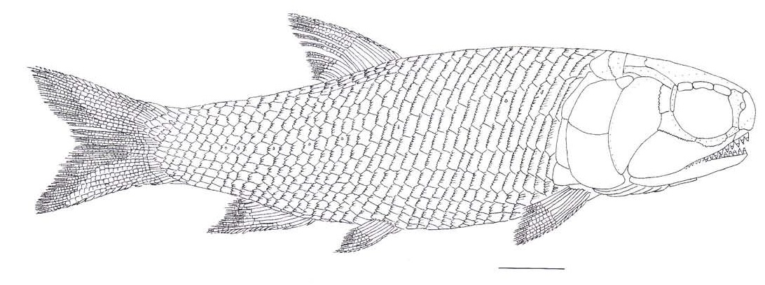 Perleìdus altolepis (Deecke, 1889). Restoration. Scalc bar: 10 trm.